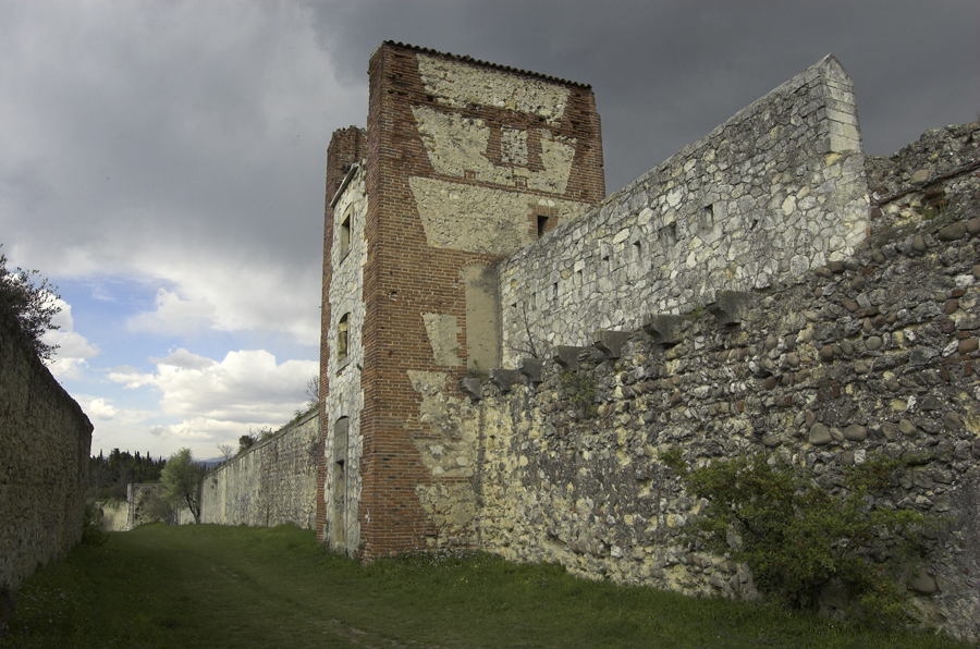 Mura settentrionali di Verona, costruite da Cangrande e ammodernate dagli austriaci nell'Ottocento